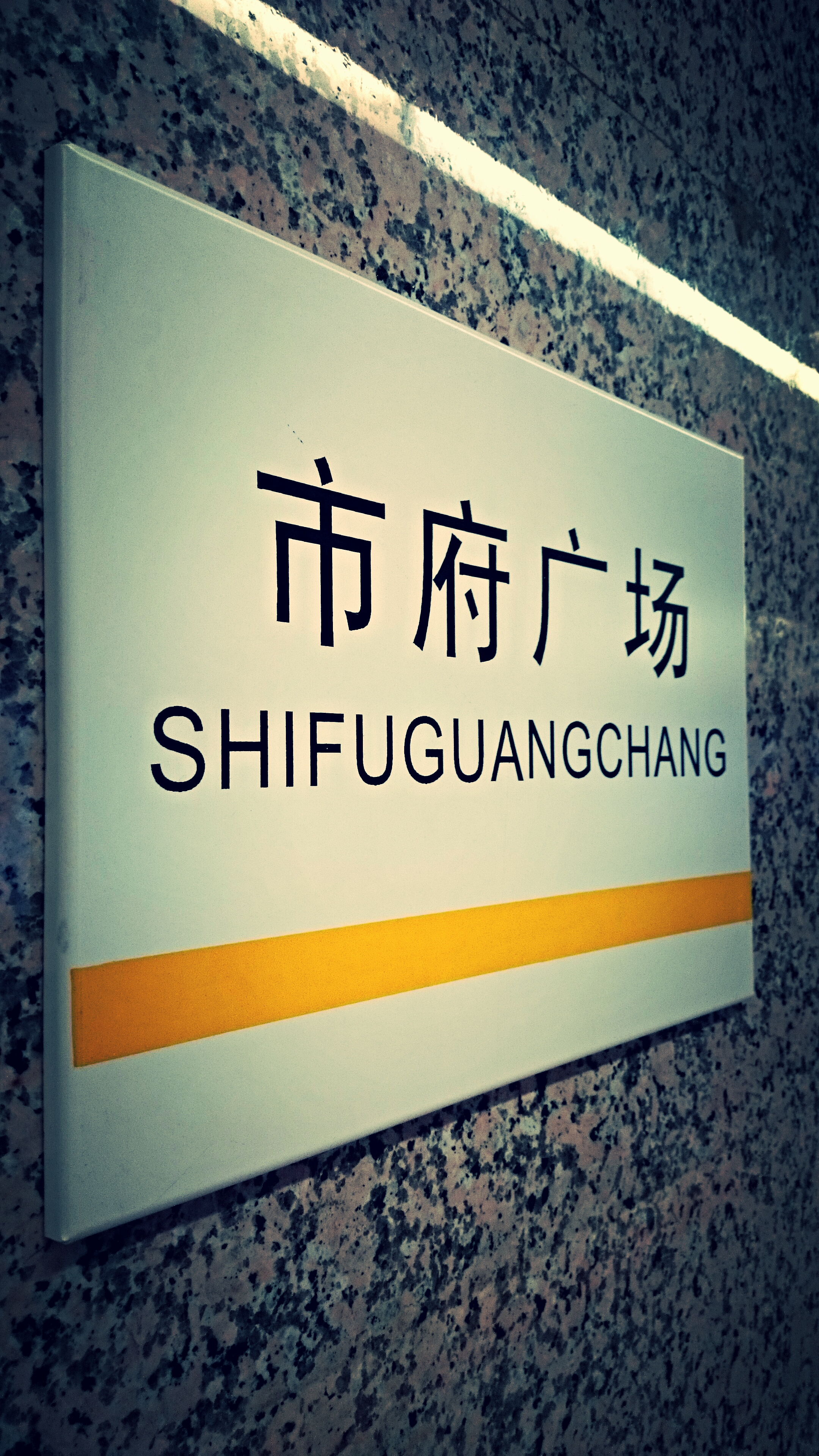 沈阳·地铁二号线市政府站站牌